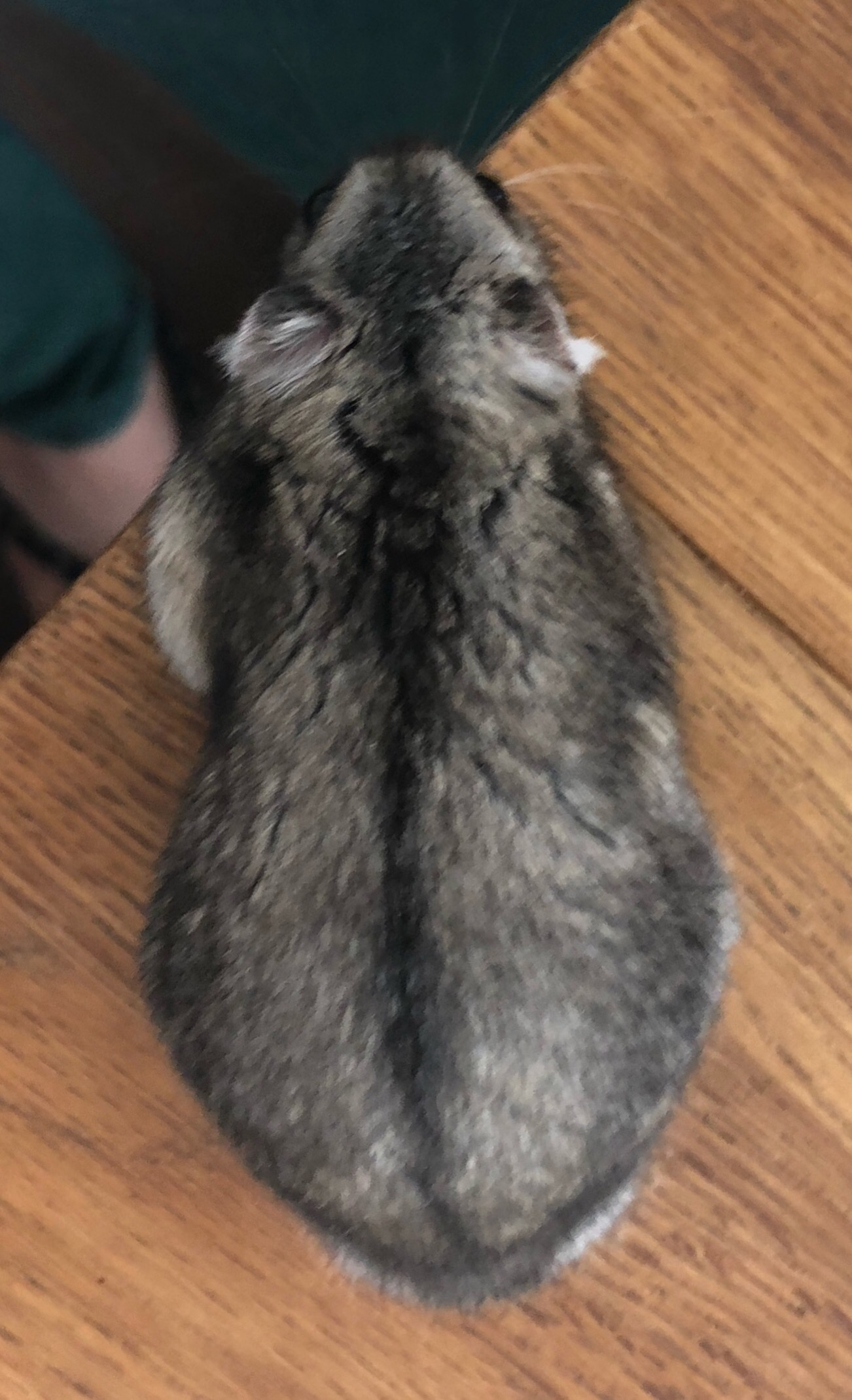 ジャンガリアンハムスター（ノーマル）の背中。背面正中線上に一本の黒い帯がある。